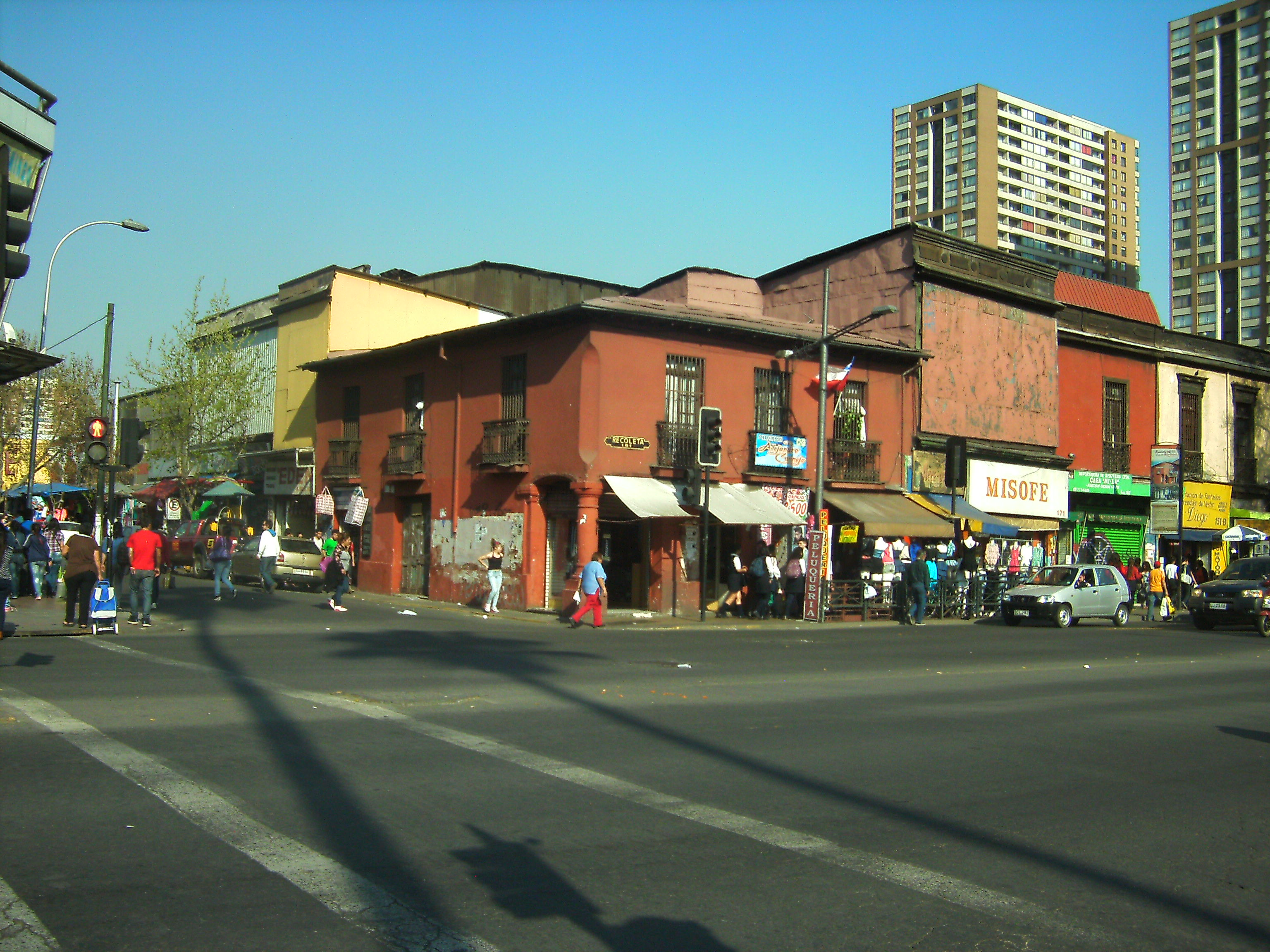 Casa del Pilar de Esquina monumento nacional ubicada en el barrio Patronato en Santiago de Chile. This is a photo of a national monument in Chile: 863